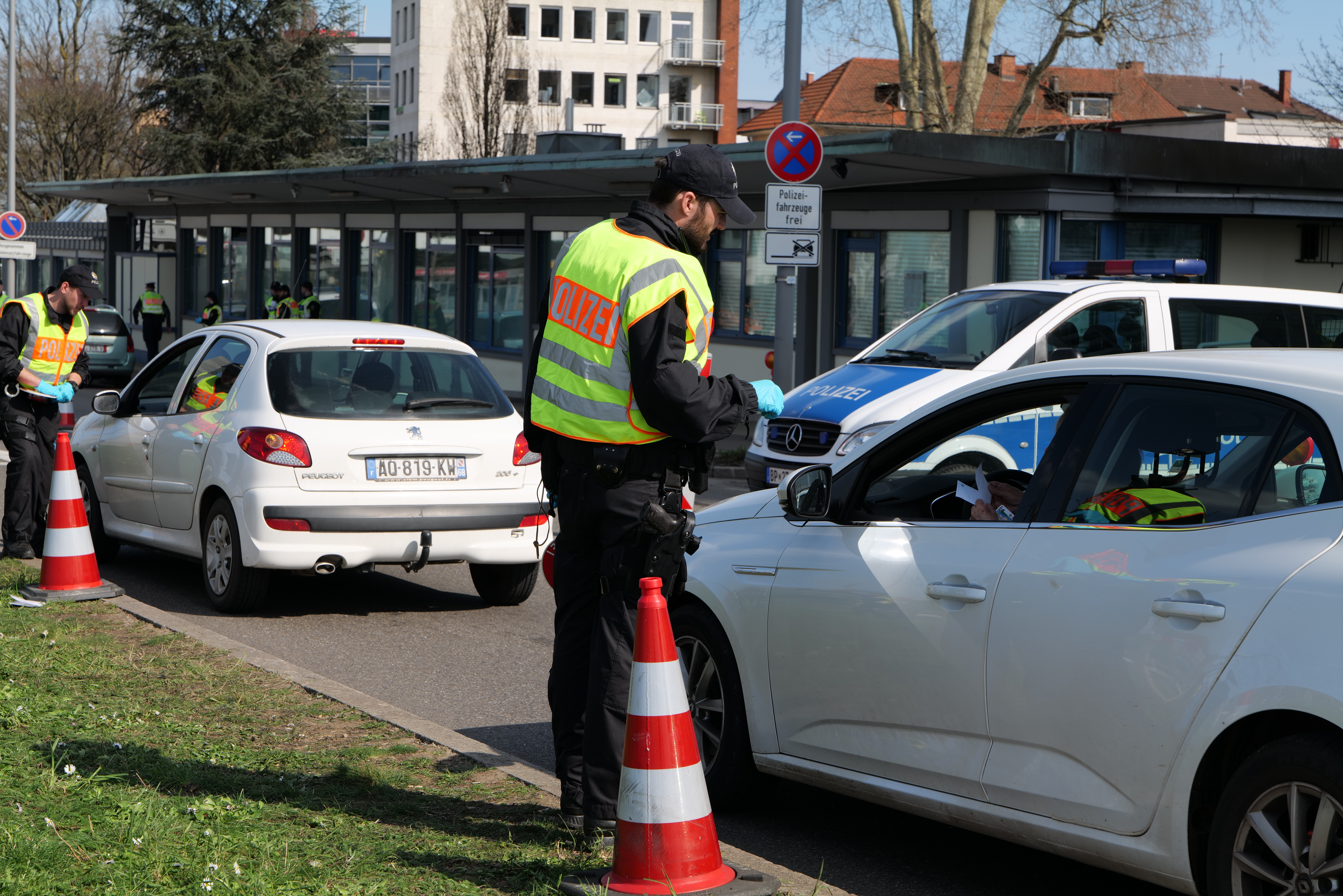 Grenzkontrollen von Ankommenden auf der deutschen Seite der Europabrücke zwischen Straßburg und Kehl am 16. März 2020.